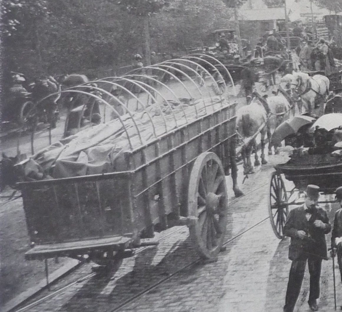 Détail d'une photo publiée dans un album de photographies consacré à la visite des souverains russes à Paris.